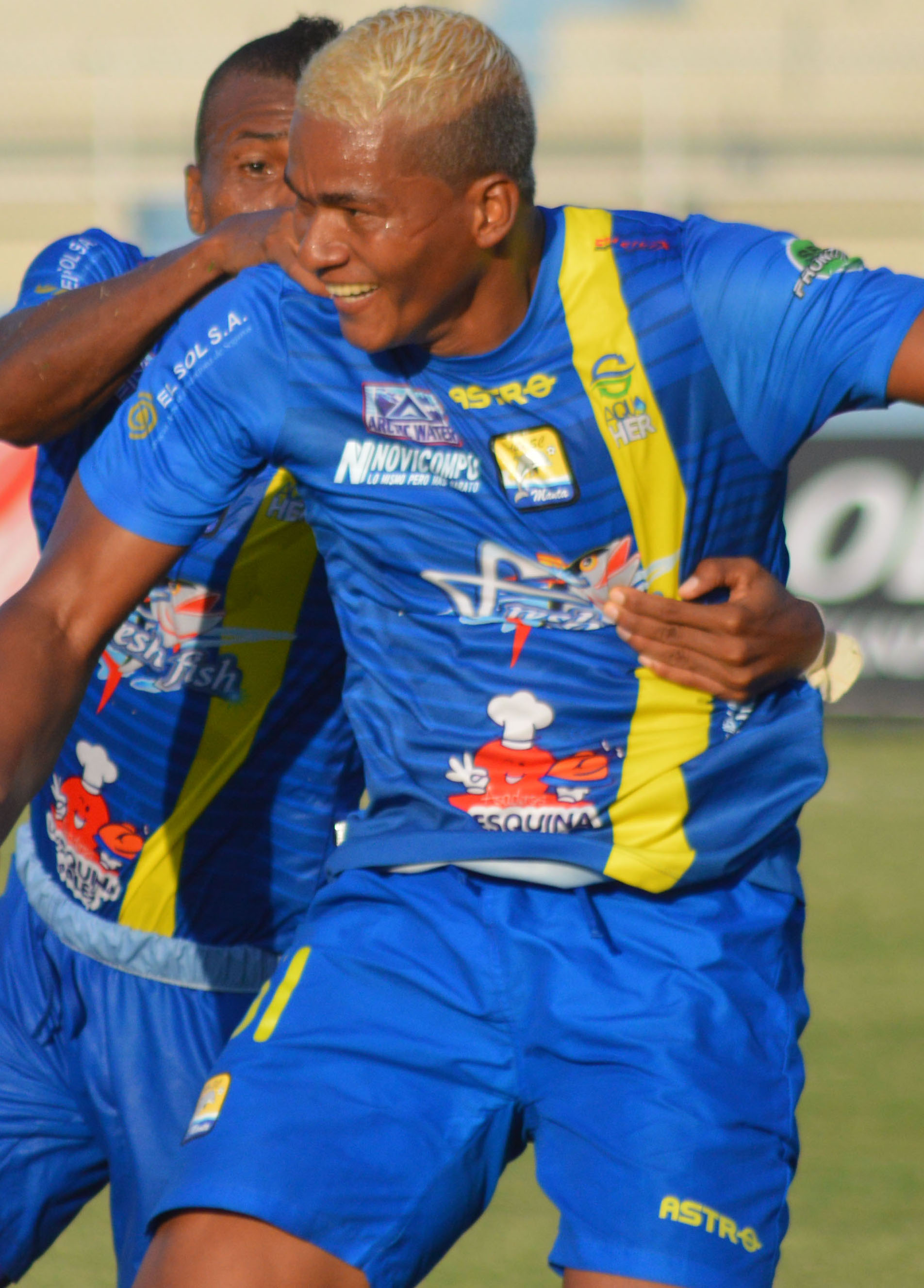 Elvis Bone jugando para Delfín Sporting Club de Manta en 2015